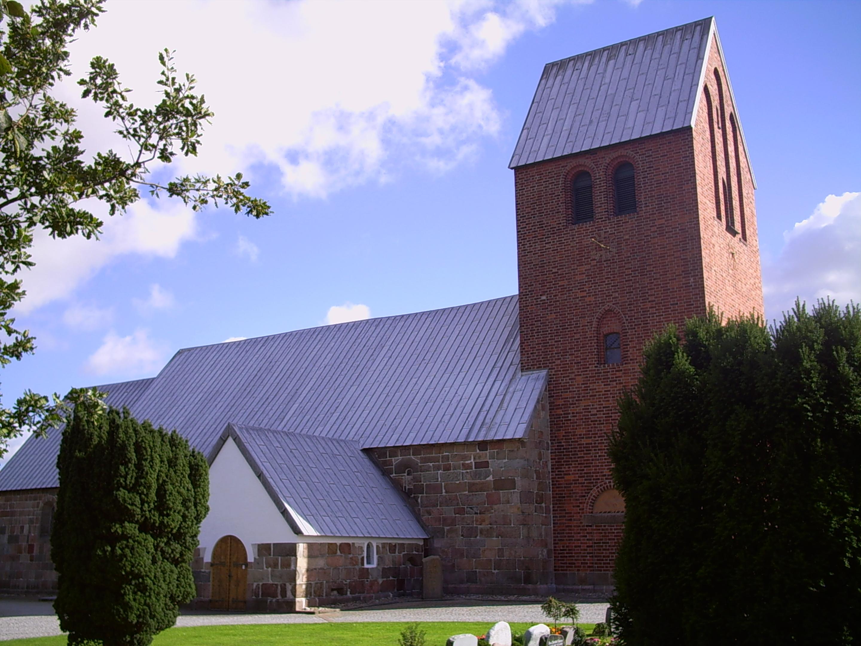 Jernekirke